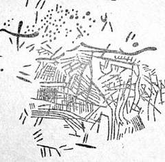 Петрогліфи Кам'яної Могили